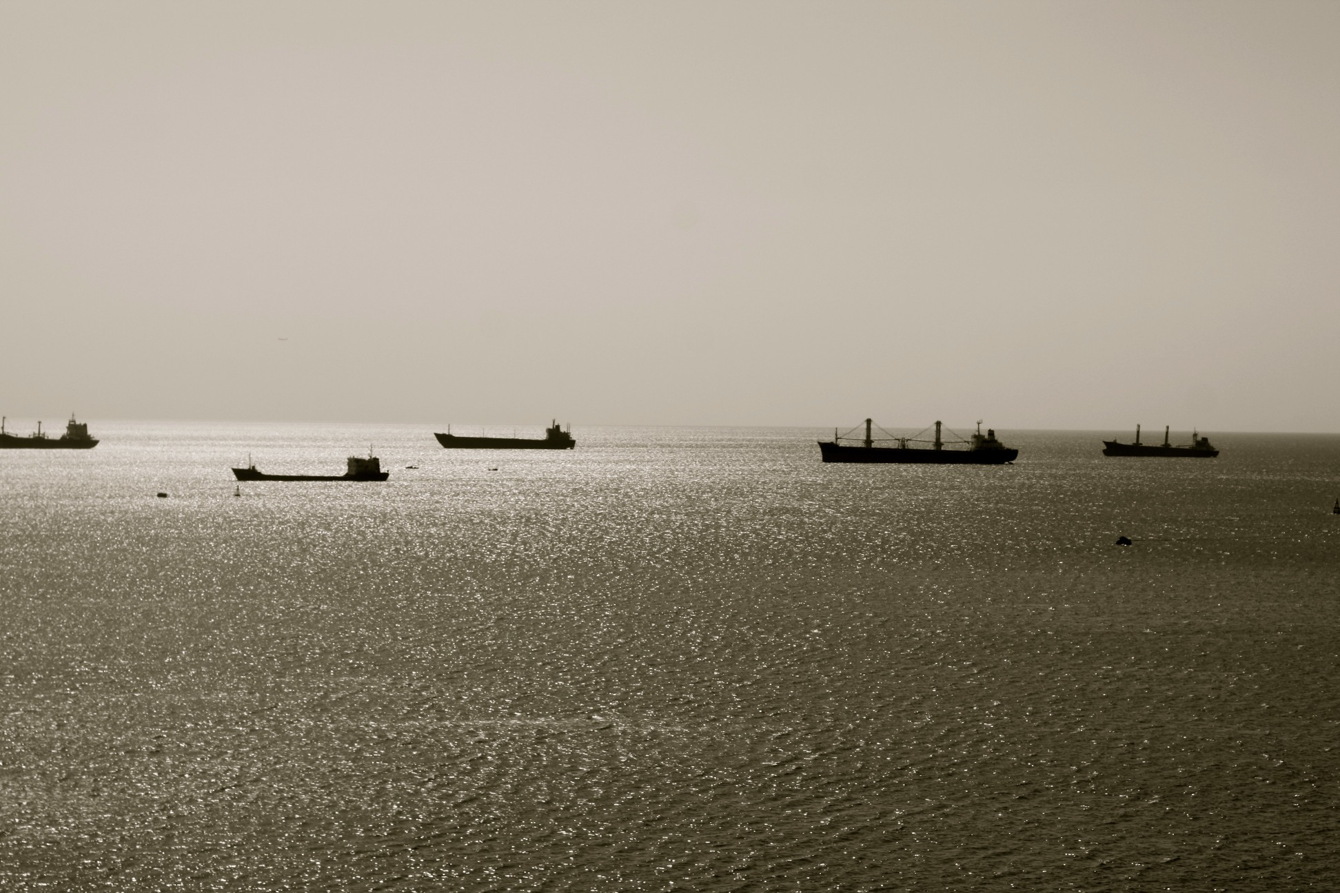 Cargo à l'horizon au lever du soleil en Turquie